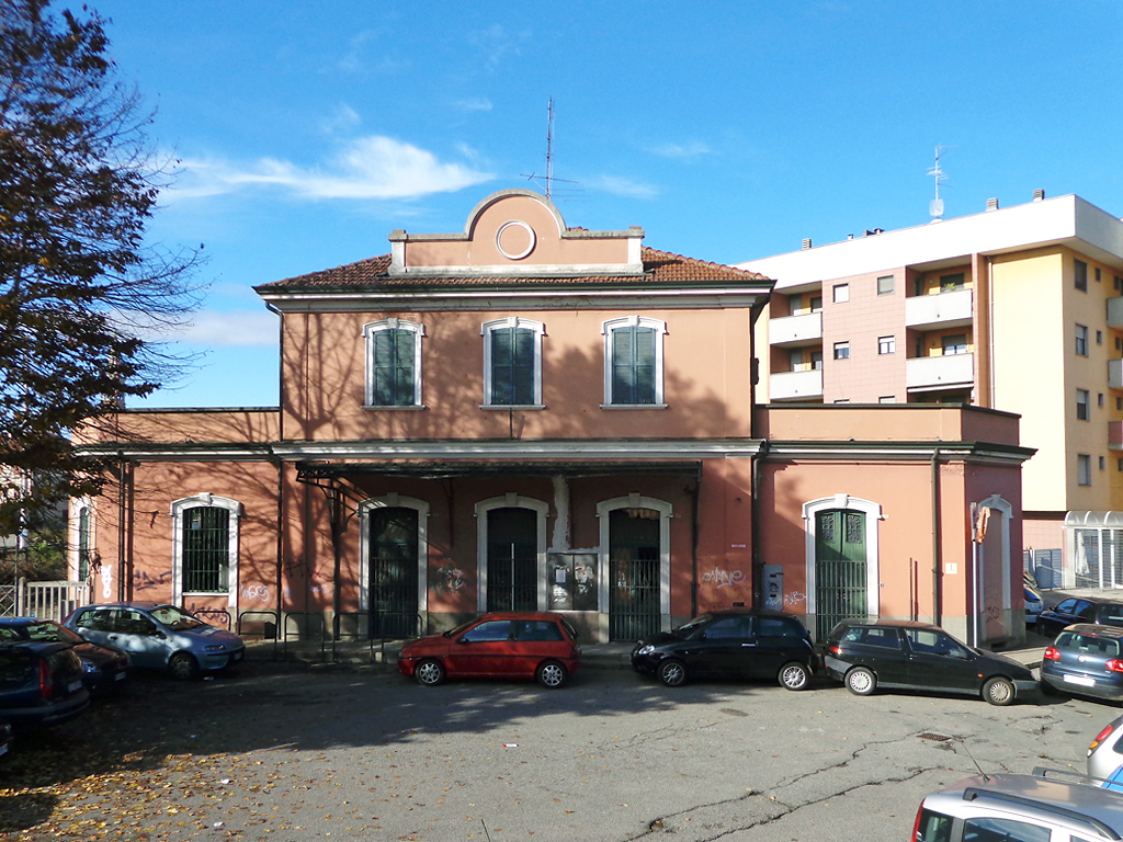 Vecchia stazione ferroviaria FNM di Novara, il fabbricato viaggiatori dal lato della strada.